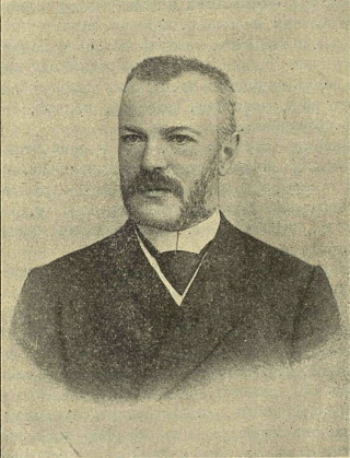 Богданович, Николай Модестович (1856—1903)